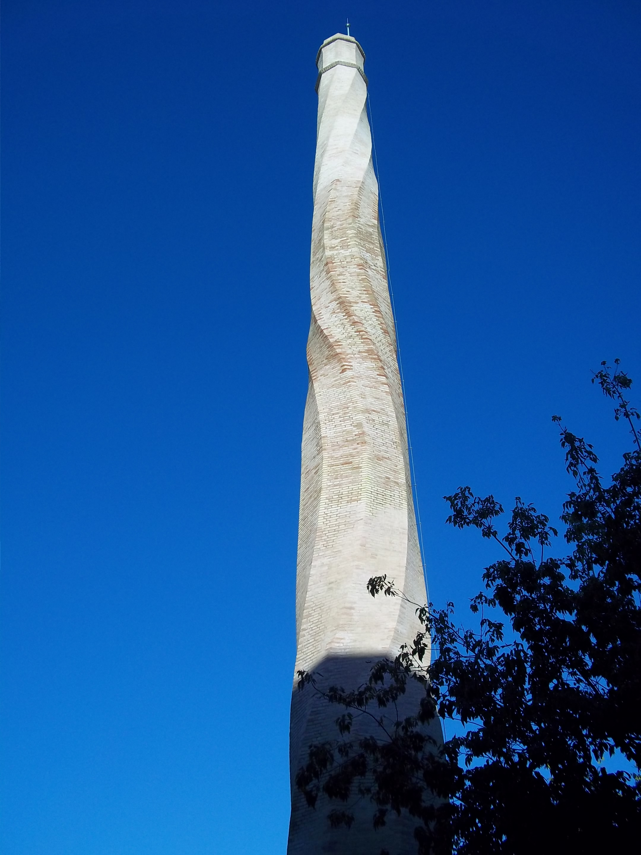 Fumeral Rajolar (Alfara del Patriarca) 13.025-010.